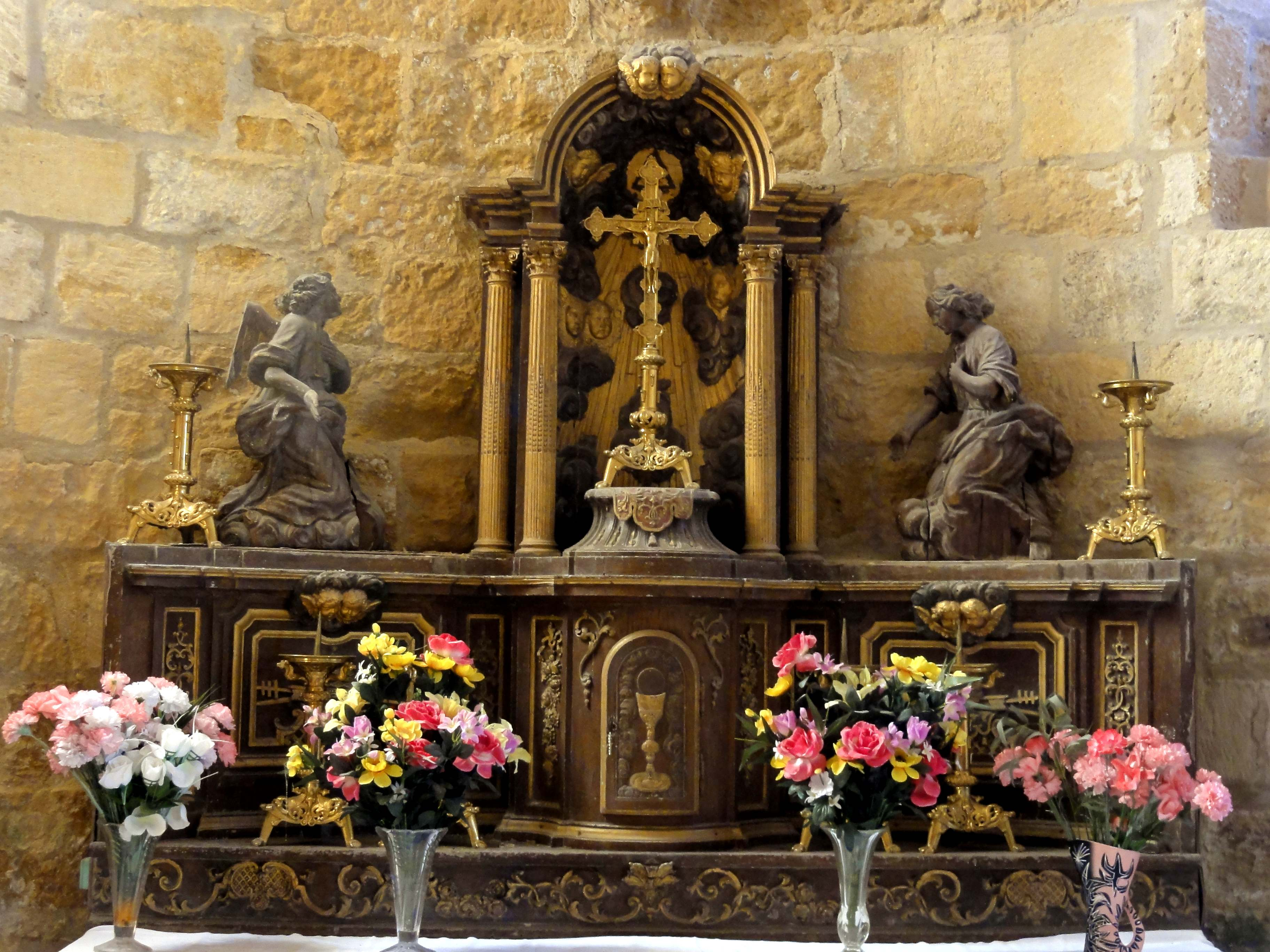 Mobilier de l'église (voir titre).